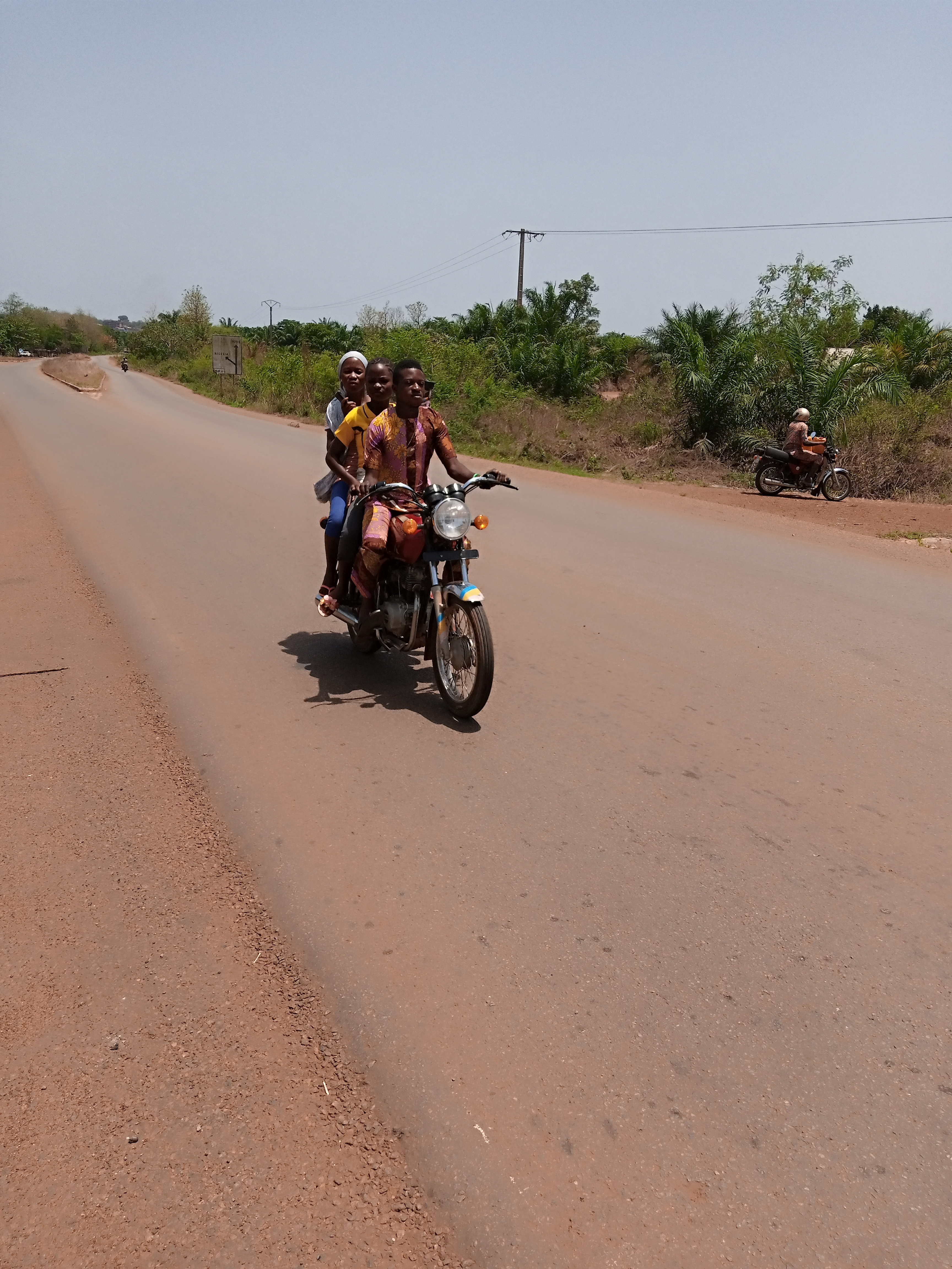 on reste a trois sur une moto This is an image with the theme "Africa on the Move or Transport" from: Benin